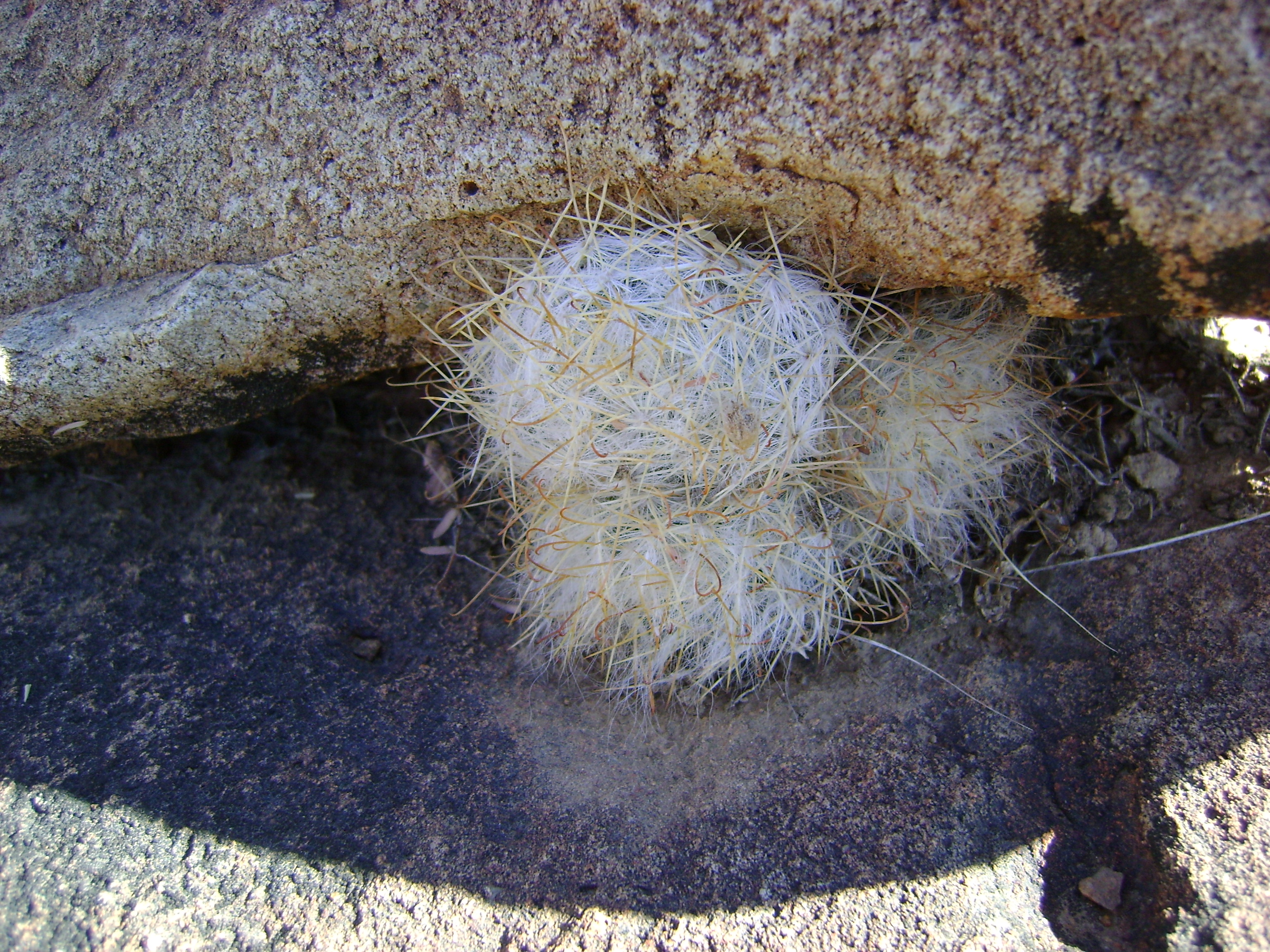 Rio Nazas, Durango